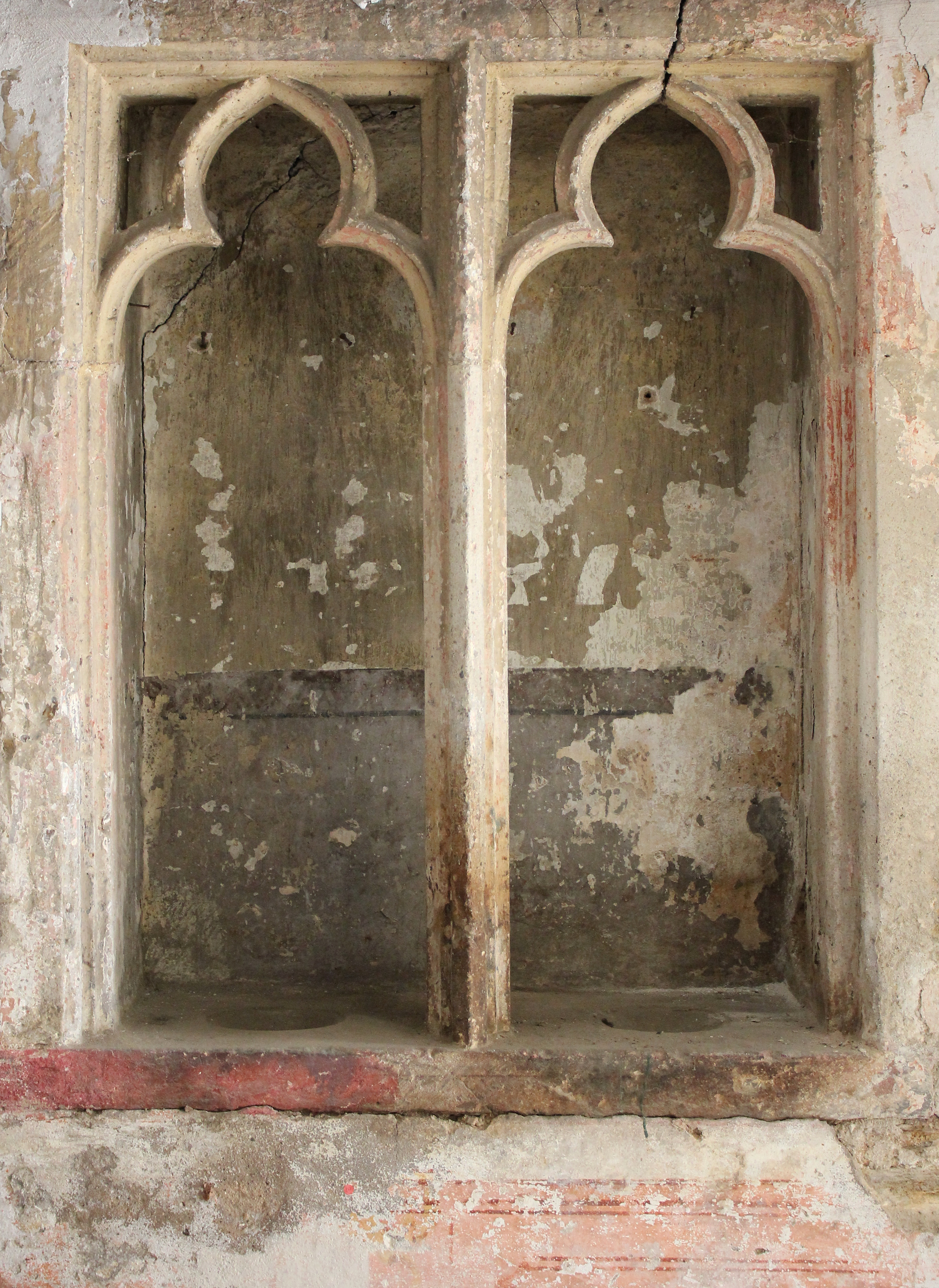 Sakrarium in der Alten Kapelle von Mülheim